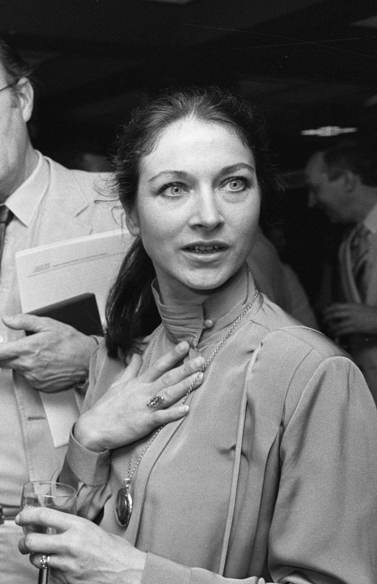 V.l.n.r. Prinses Margriet, dhr. Pieter van Vollenhoven, dhr. Ton Lutz en mw. Alexandra Radius